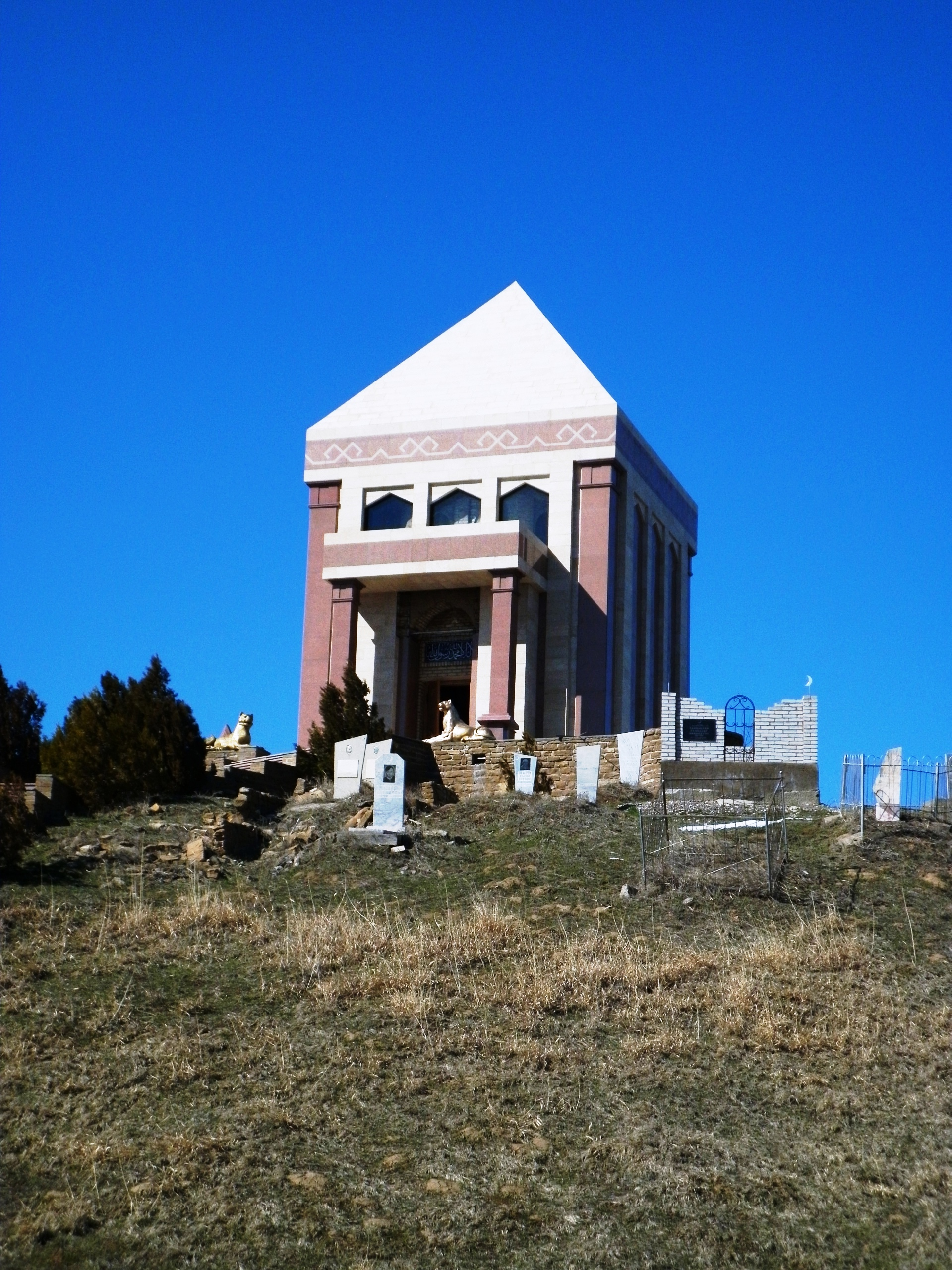 мавзолей Байдибек ата март 2011